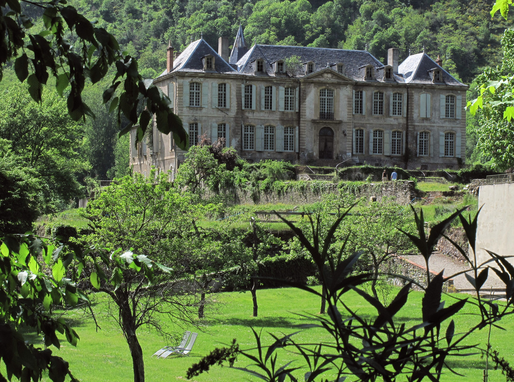 Vue de l'actuel château de Gudanes construit au milieu du XVIIIe siècle.